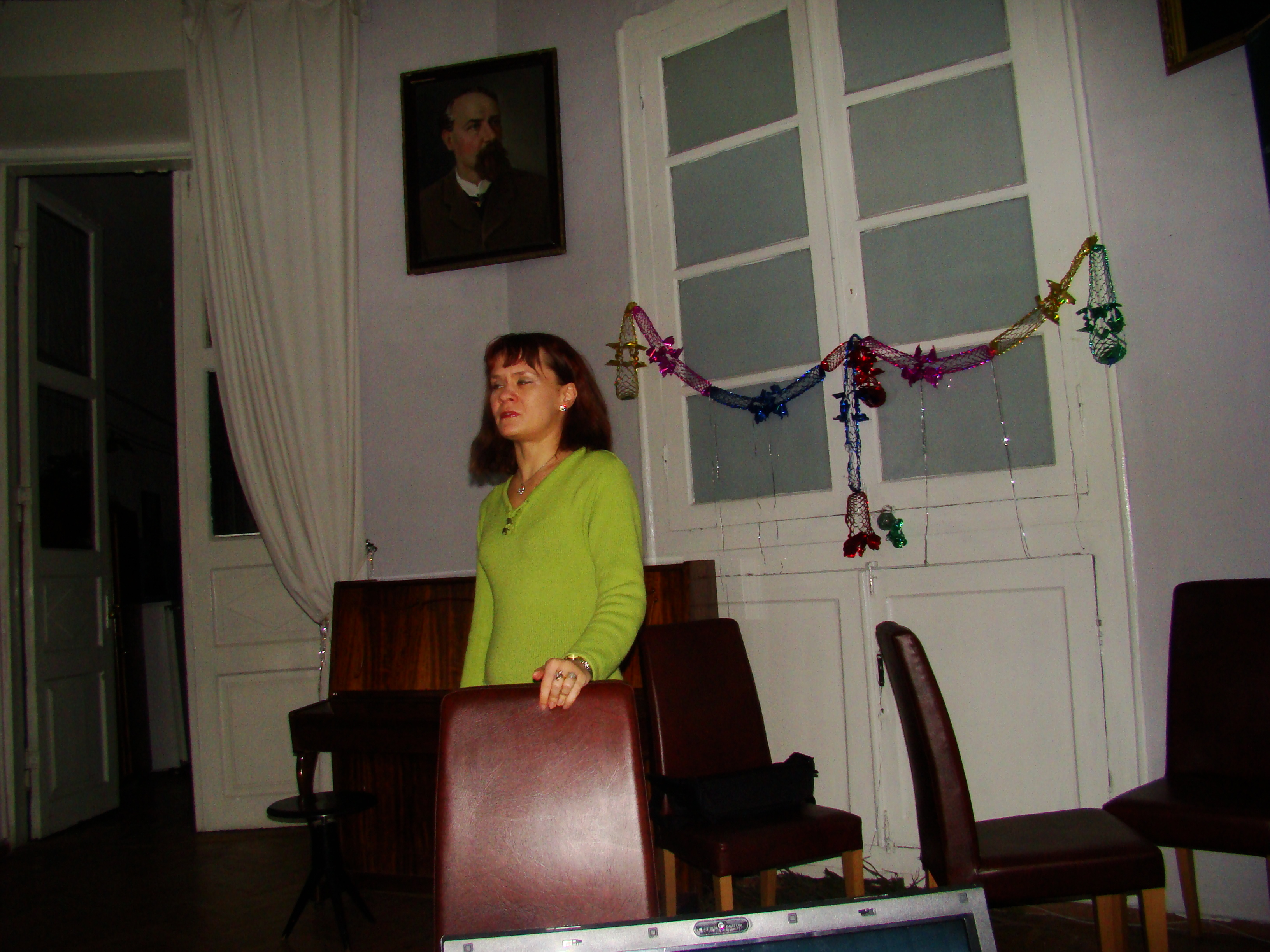 Лекція Олени Махової. Фото 2. 18.01.2009